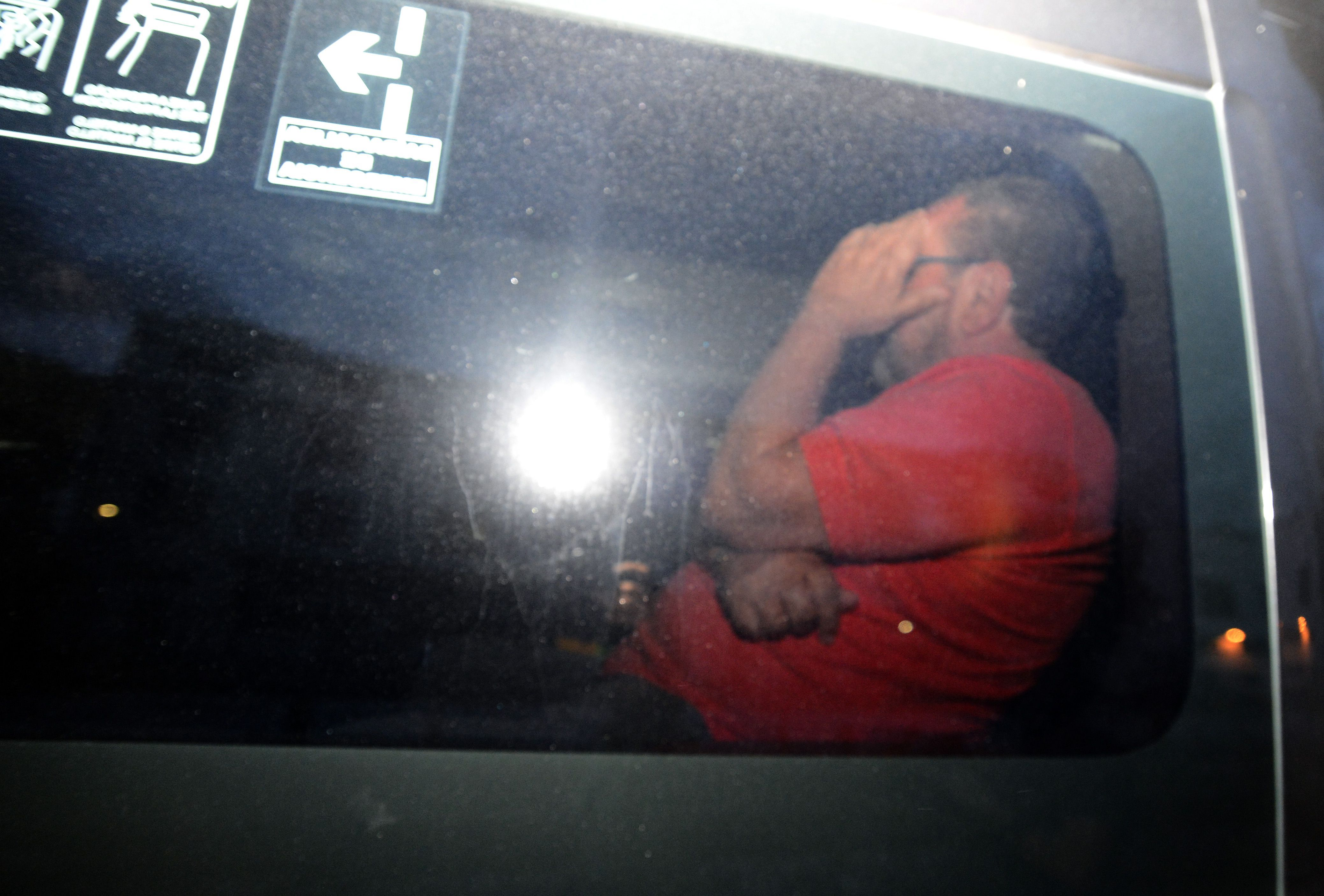 O empresário Zwi Skornicki, preso preventivamente na Operação Acarajé, 23ª fase da Operação Lava Jato, sendo transferido da sede da Polícia Federal, no Rio de Janeiro, para Curitiba.